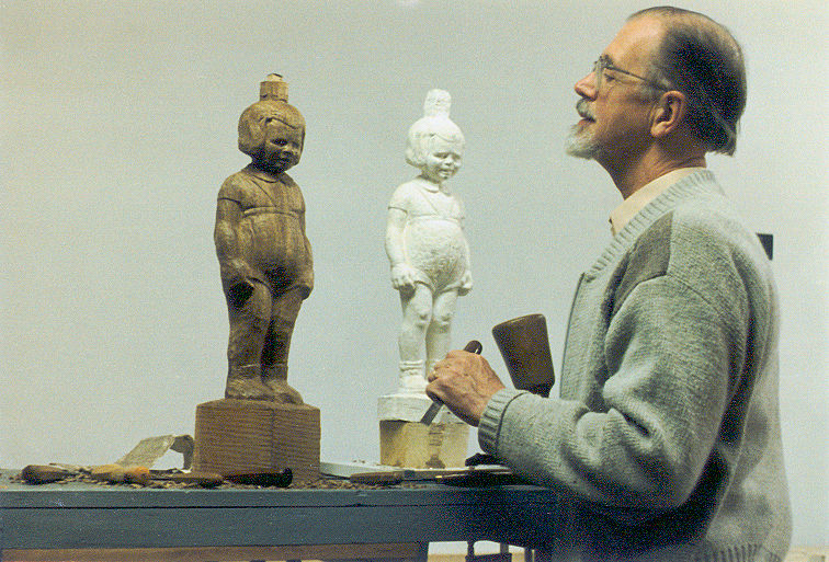 Frans Fritschy aan het werk in zijn atelier (1968)